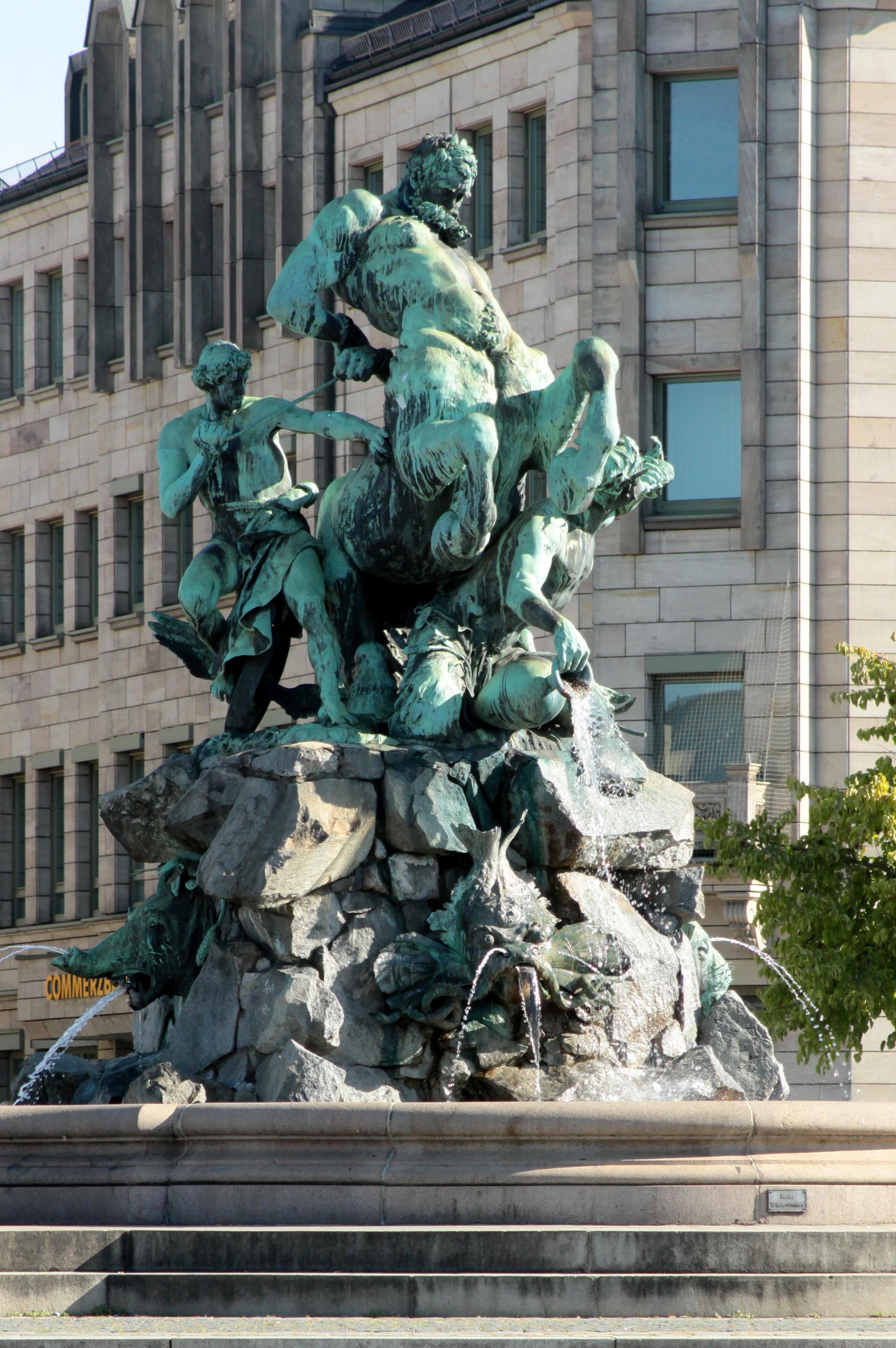 Skulptur vun engem Kentaur bei der Gare vu Fürth (Bayern)